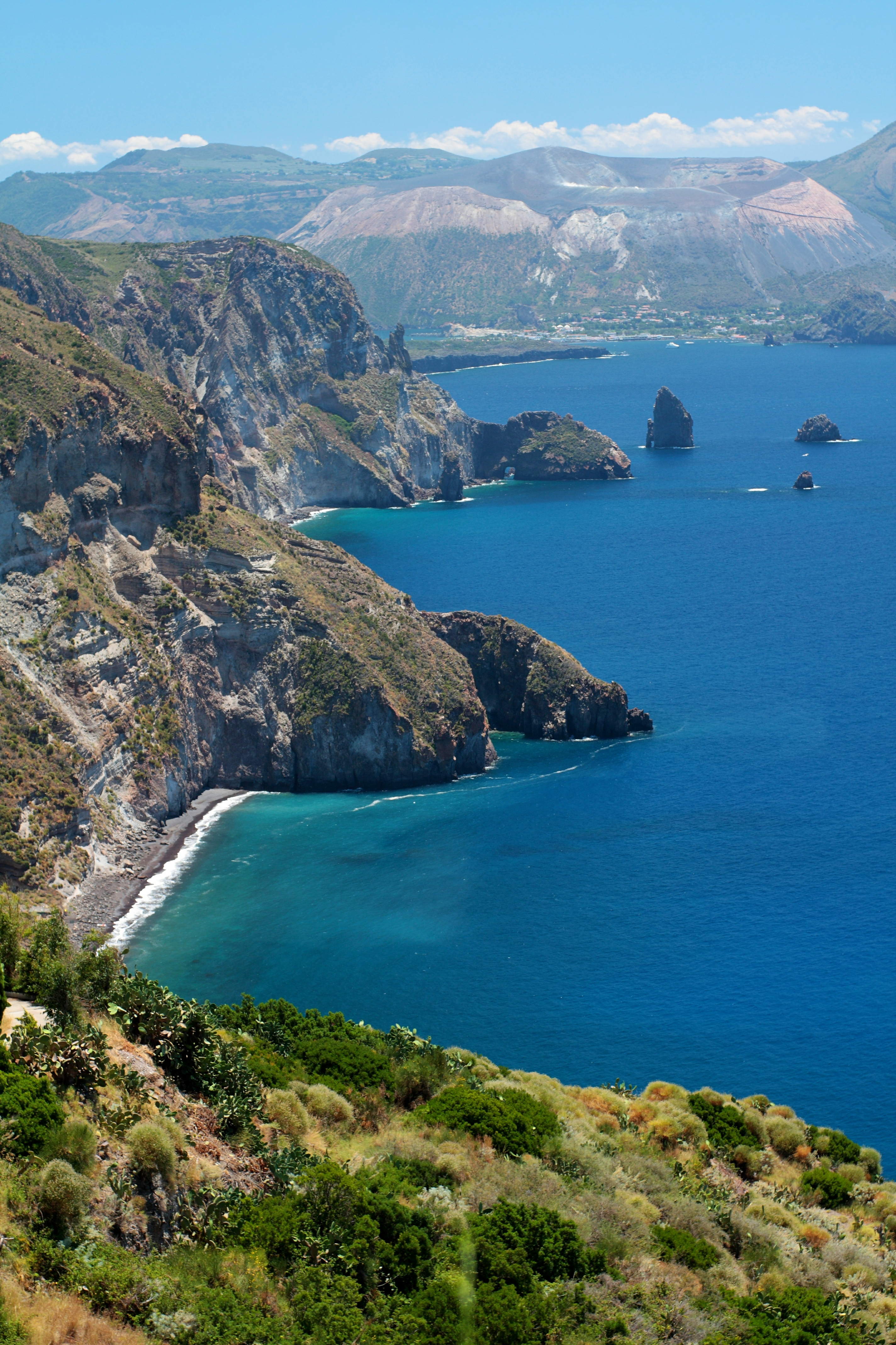 Luce di pomeriggio in Giugno